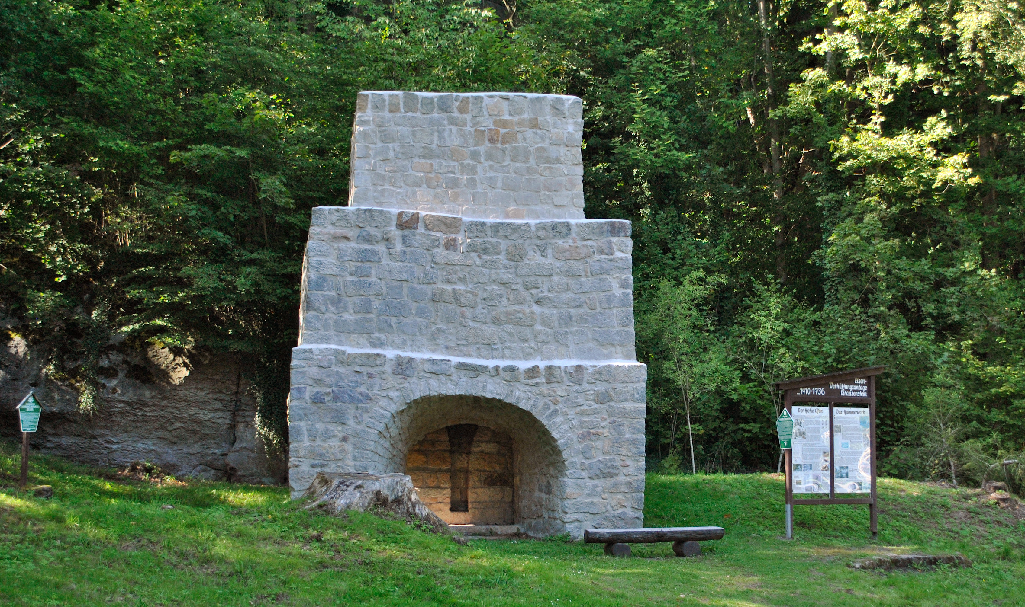 Der historische Hochofen Brausenstein im Bielatal.